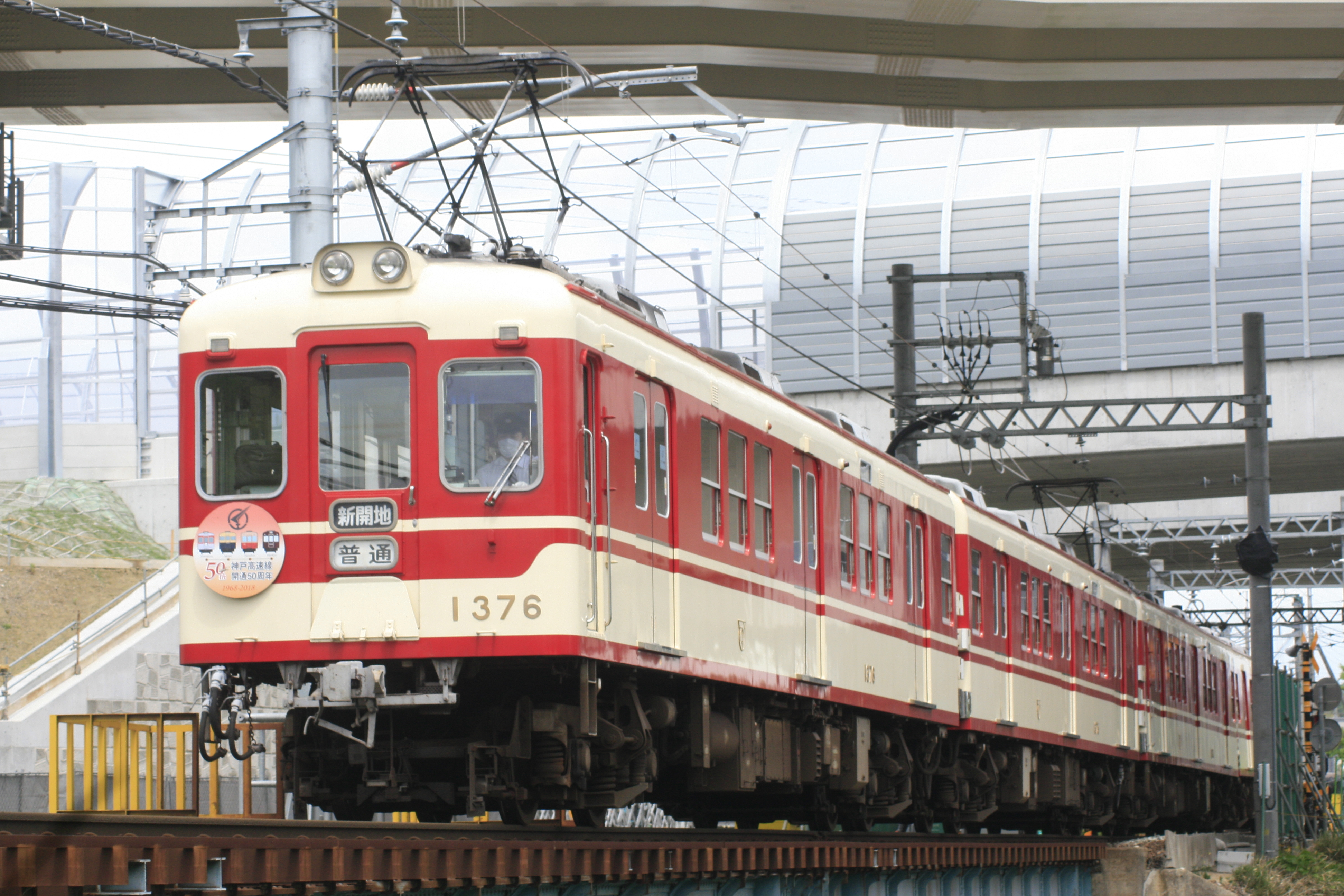 2018年5月3日に二郎駅～道場南口駅間で撮った写真です。 Canon EOS Kiss Digital X